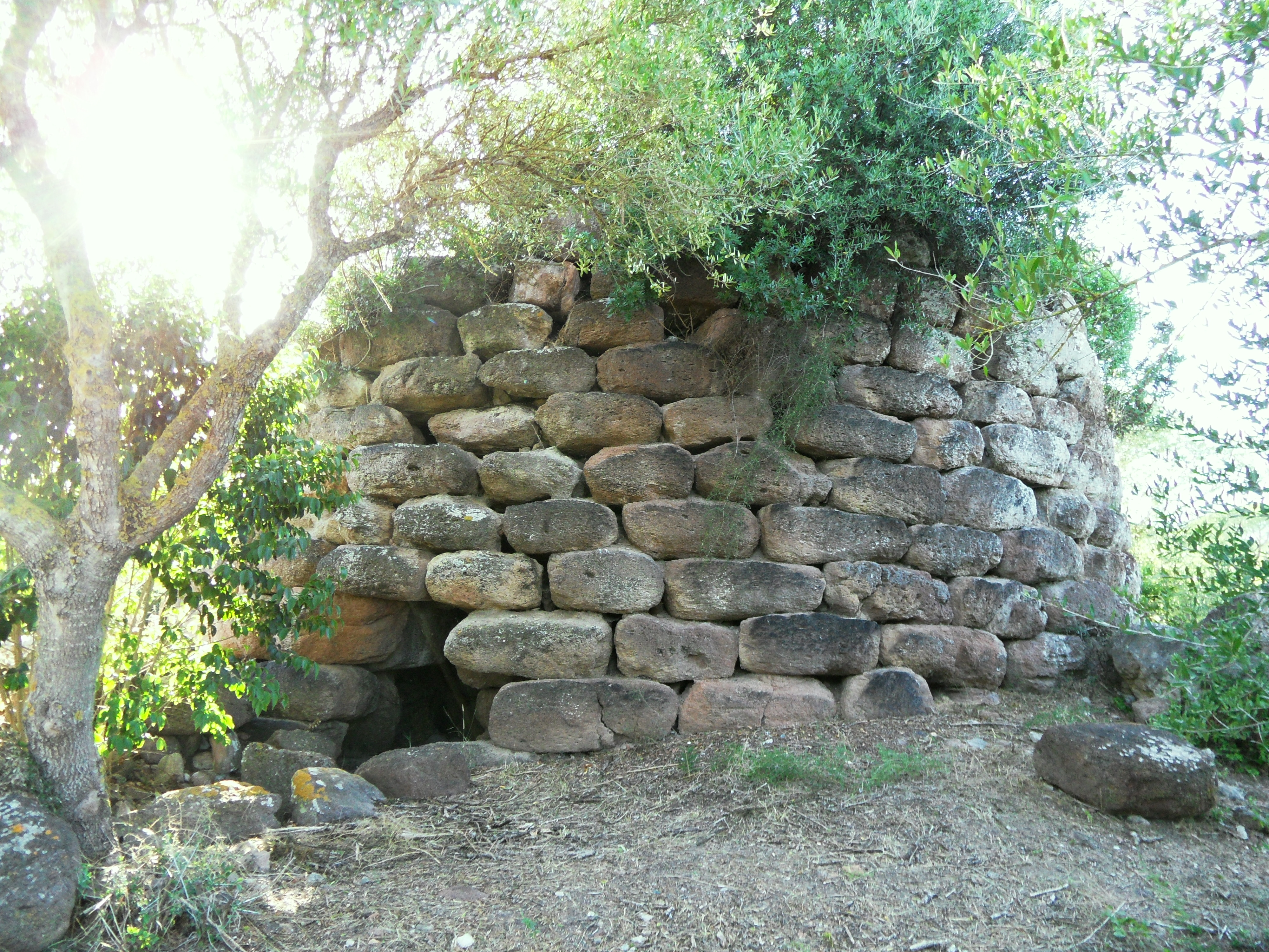 Fotografia dell'esterno del nuraghe Rumanedda, dal lato dell'ingresso